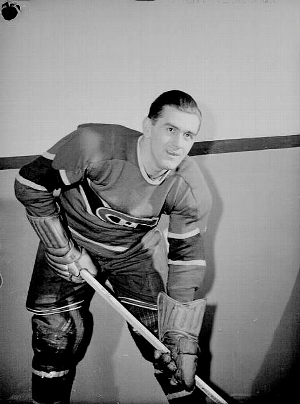 Maurice Richard